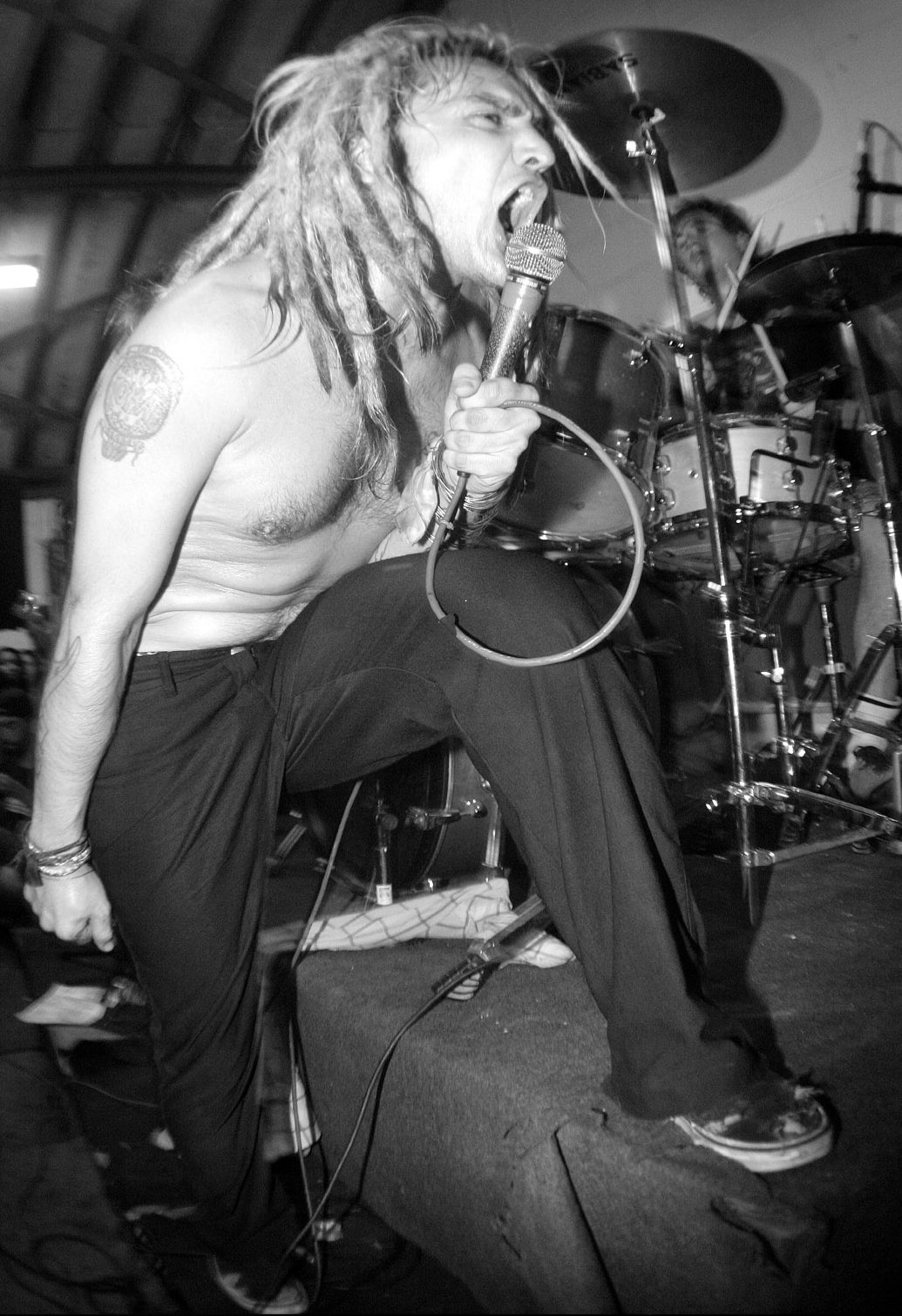 Boom Boom Kid en 2007.